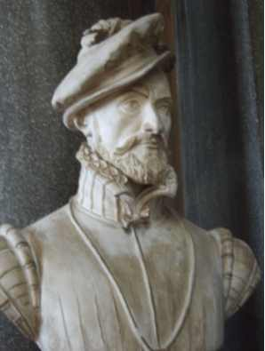 Buste de Jacques d'Albon, seigneur de Saint-André par Jean-François-Théodore Gechter; Galerie des batailles du château de Versailles.